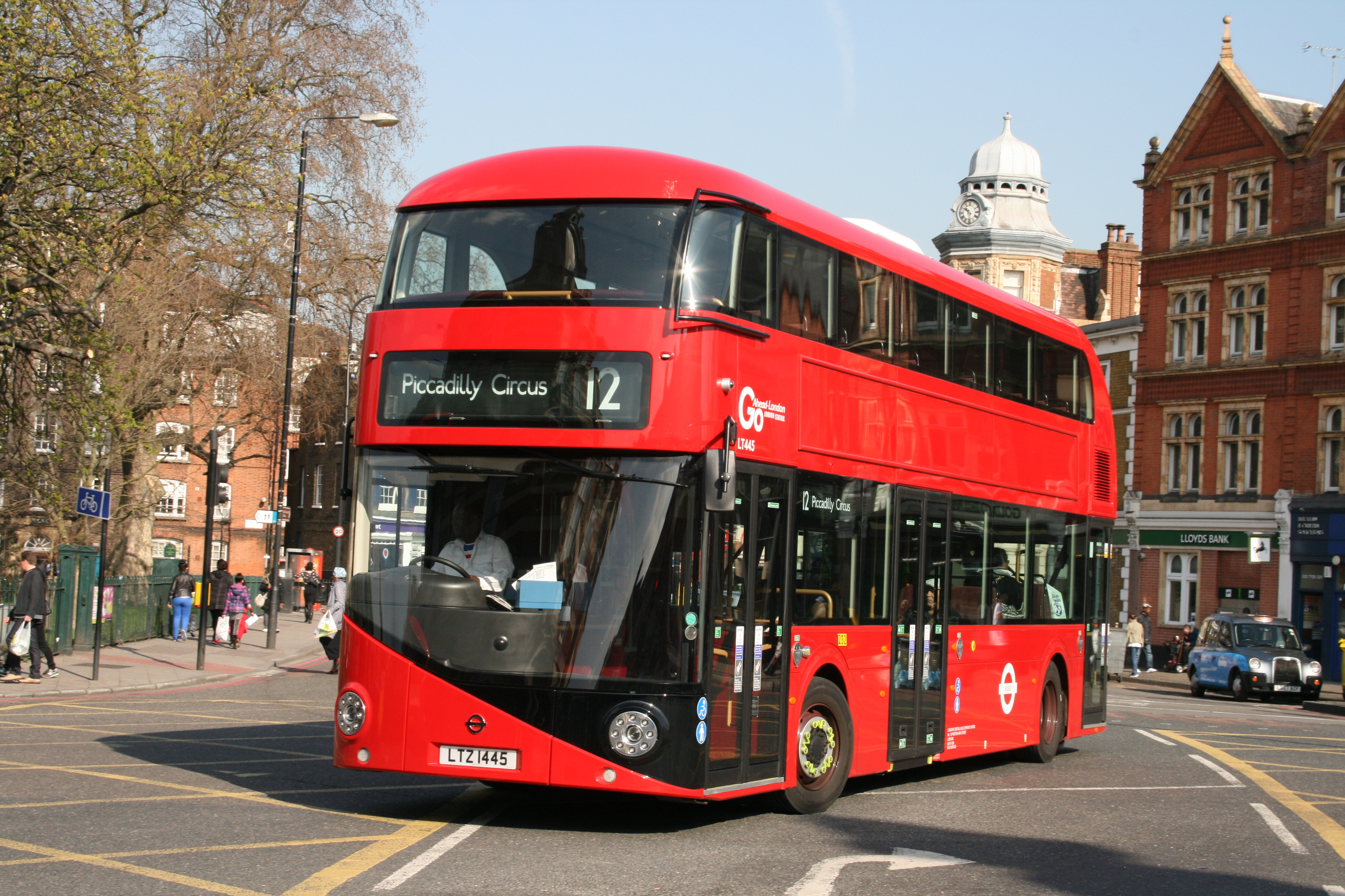 LTZ1445